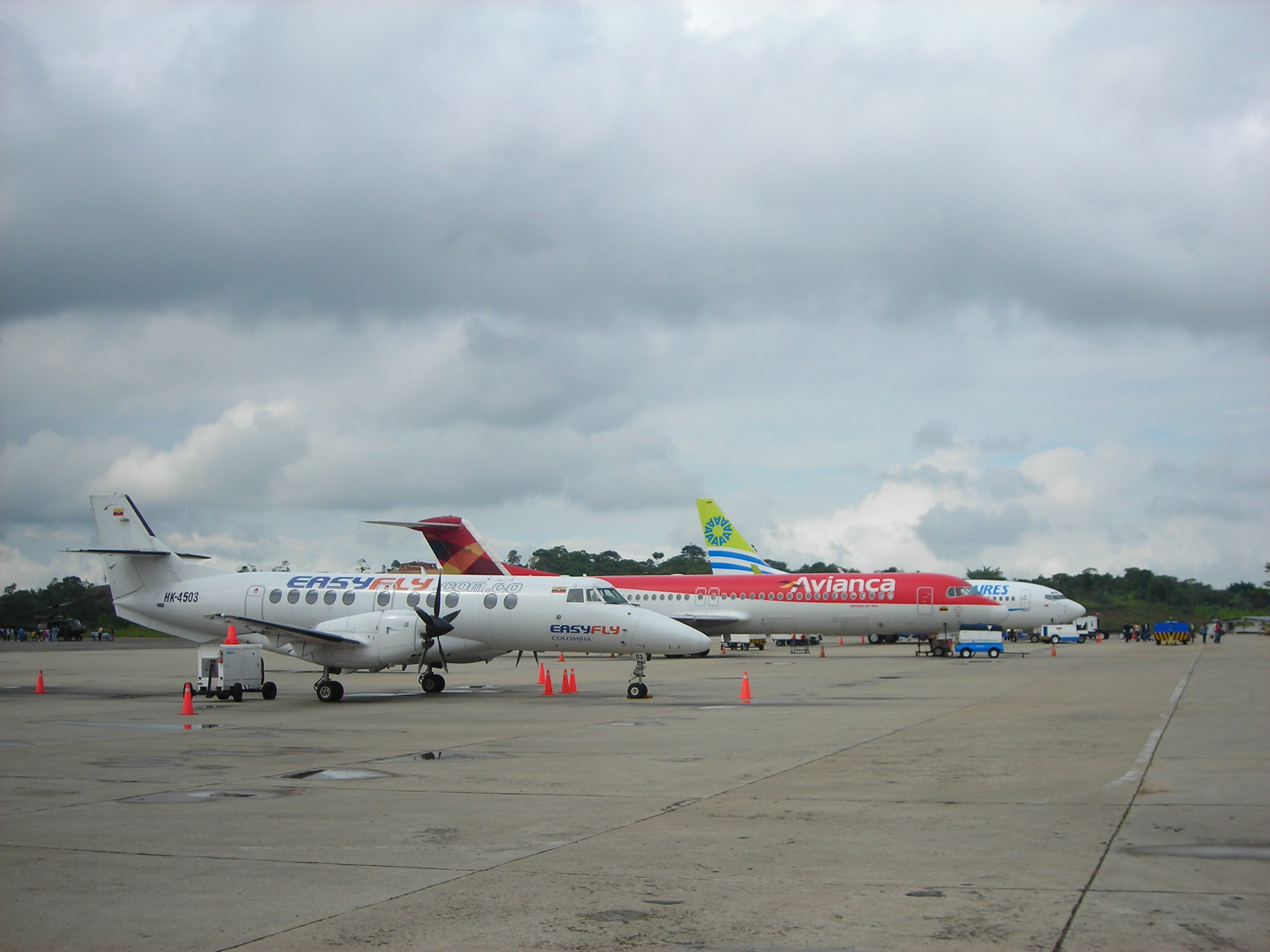 Aeropuerto de Bucaramanga BGA Colombia